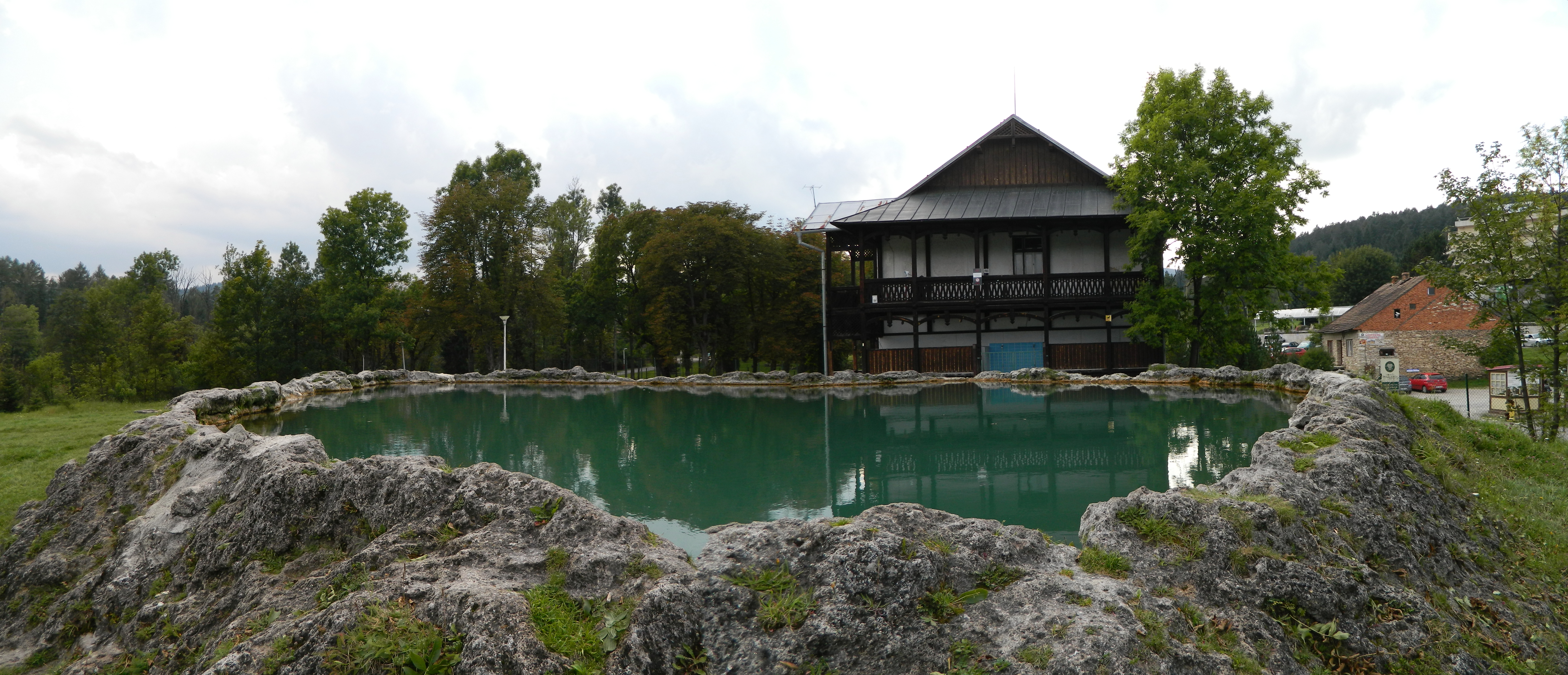 Travertínové jazierko - Kráter v kúpeľoch Vyšné Ružbachy